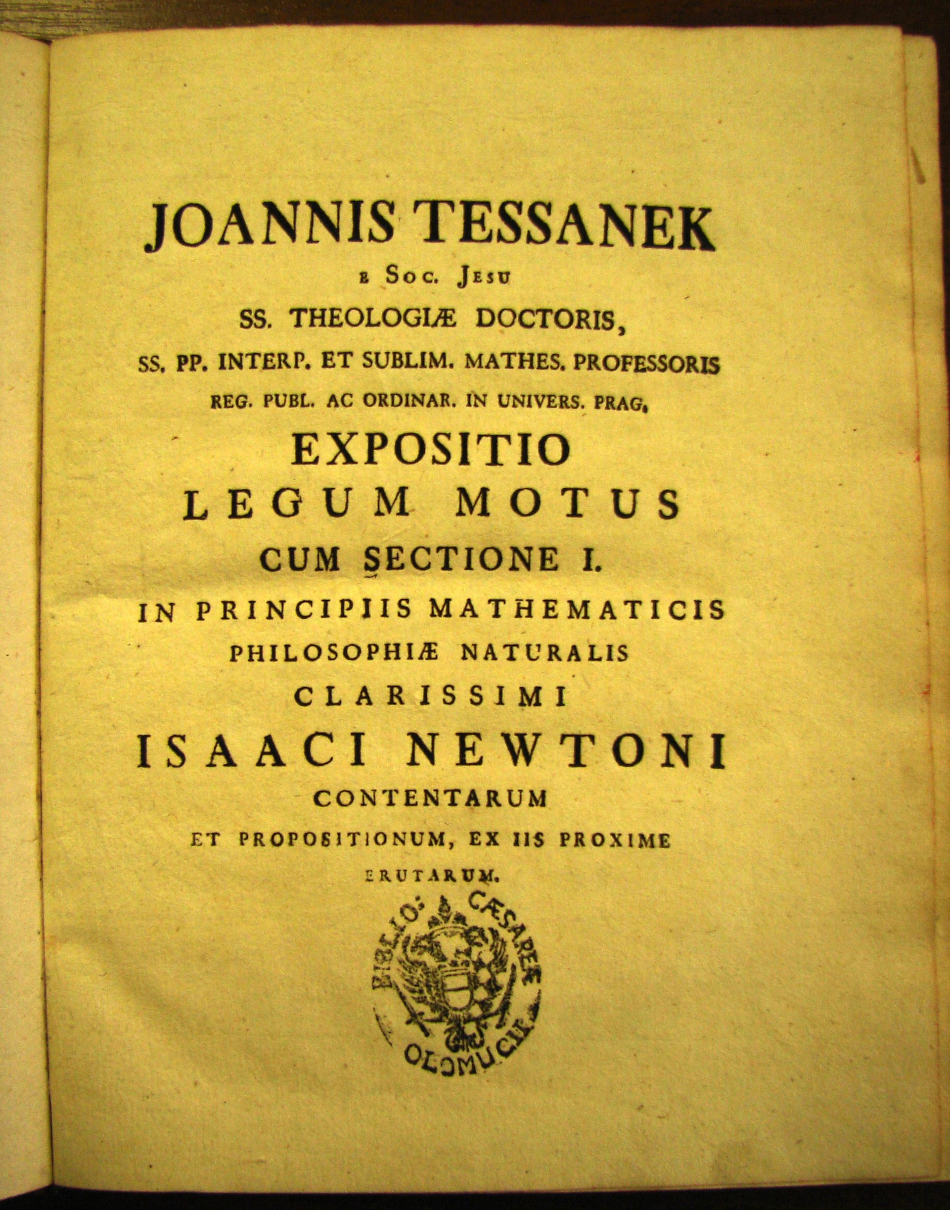 Hlavní strana knihy J. Tesánka